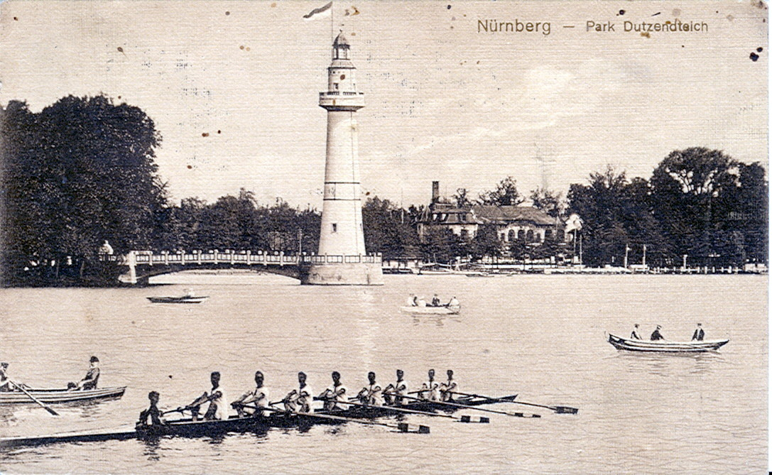 Postkarte, undatiert ( ca. 1914 ). Beschriftung: "Nürnberg - Park Dutzendteich". Auf der Rückseite: "Schönstes und größtes Konzert- und Vergnügungs-Etablissement am Platze, großer See ( 150 Kähne ), Badegelegenheit, Winter-Eissport, Haltestelle der elektrischen Straßenbahn - Restaurateur J.Wanner".